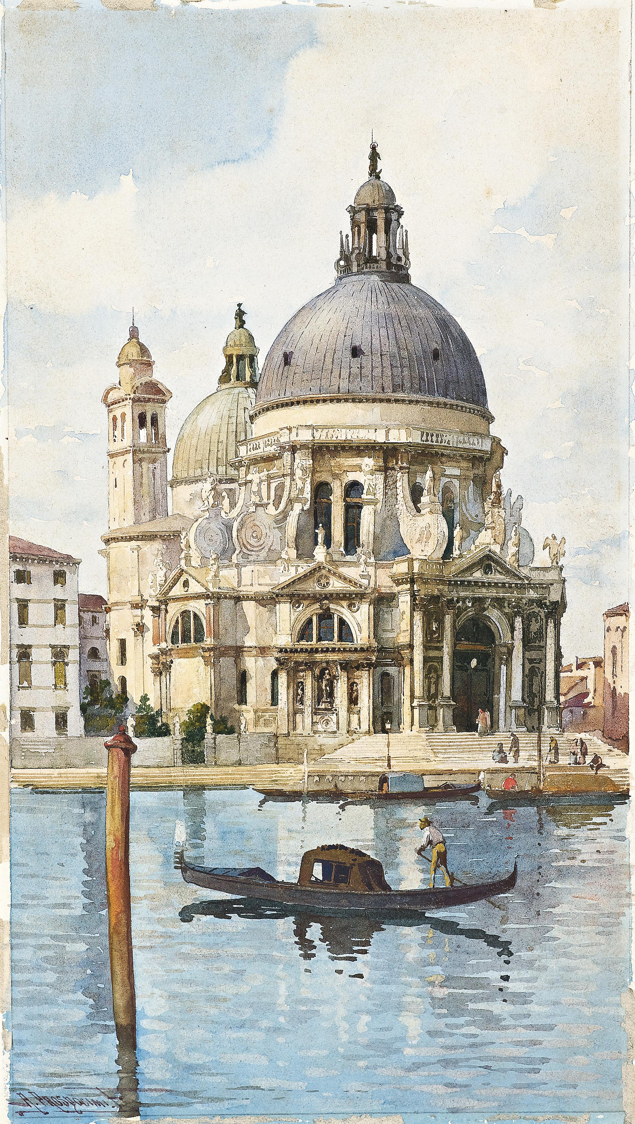 Blick auf auf Santa Maria della Salute, Venedig